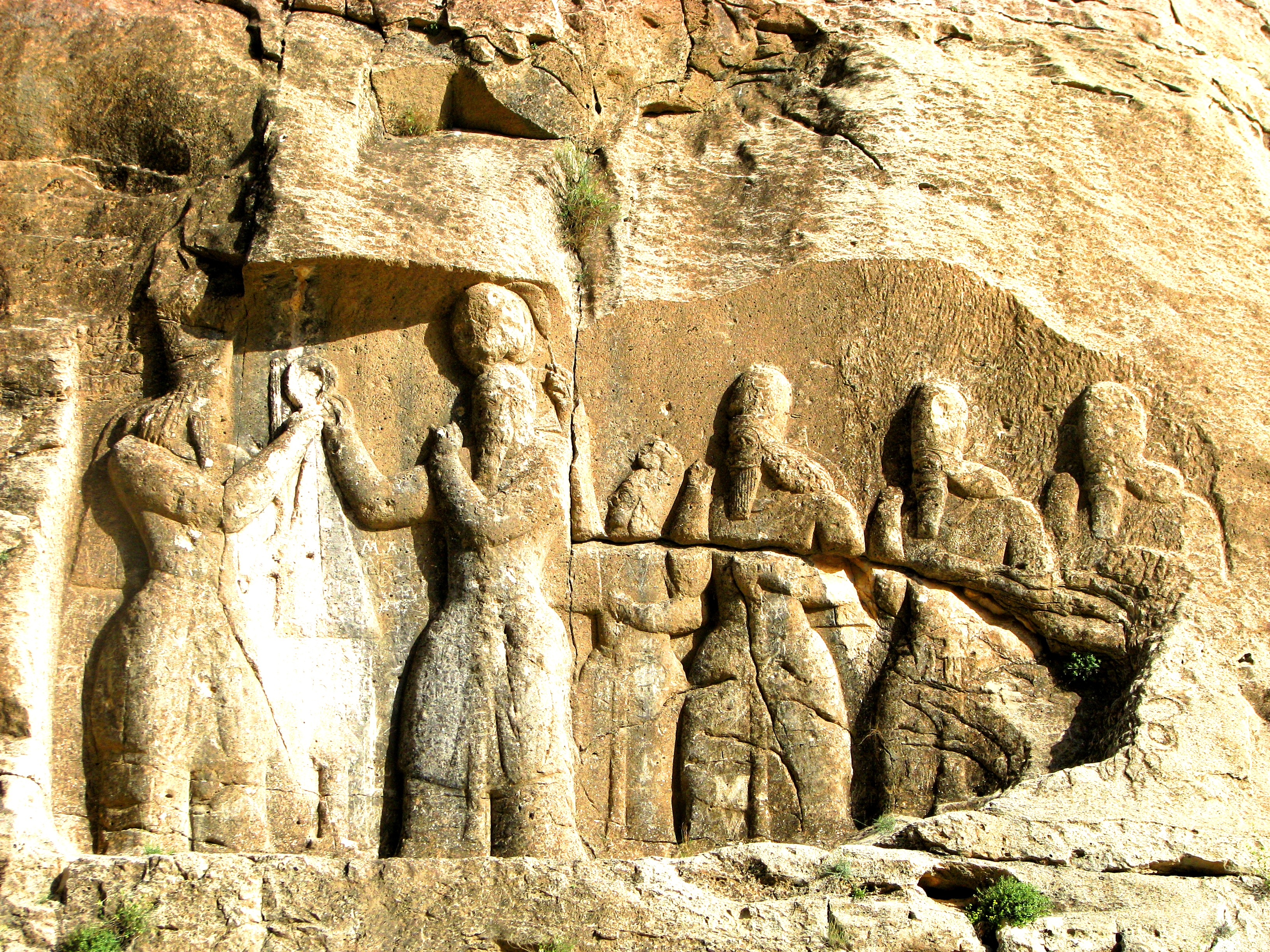 سنگ‌نگارهٔ اردشیر بابکان در فیروزآباد، استان فارس، ایران